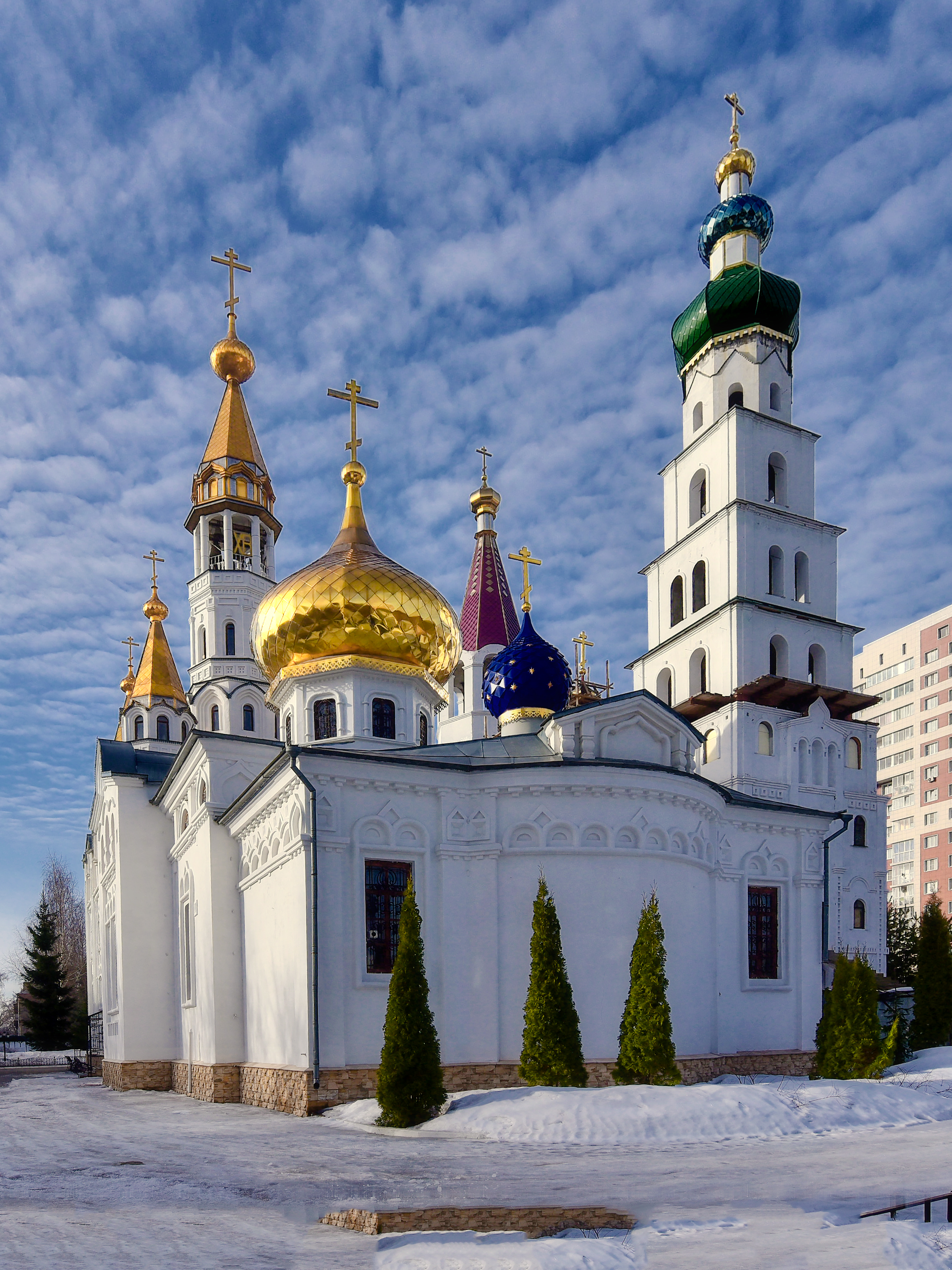 Боголюбский Храм на территории Николо-Боголюбского комплекса.